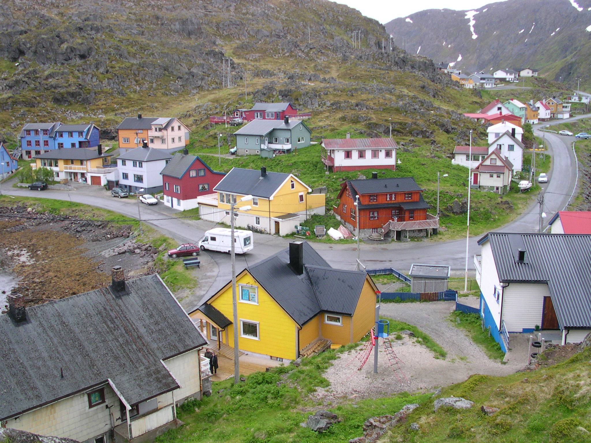 Kamøyvær